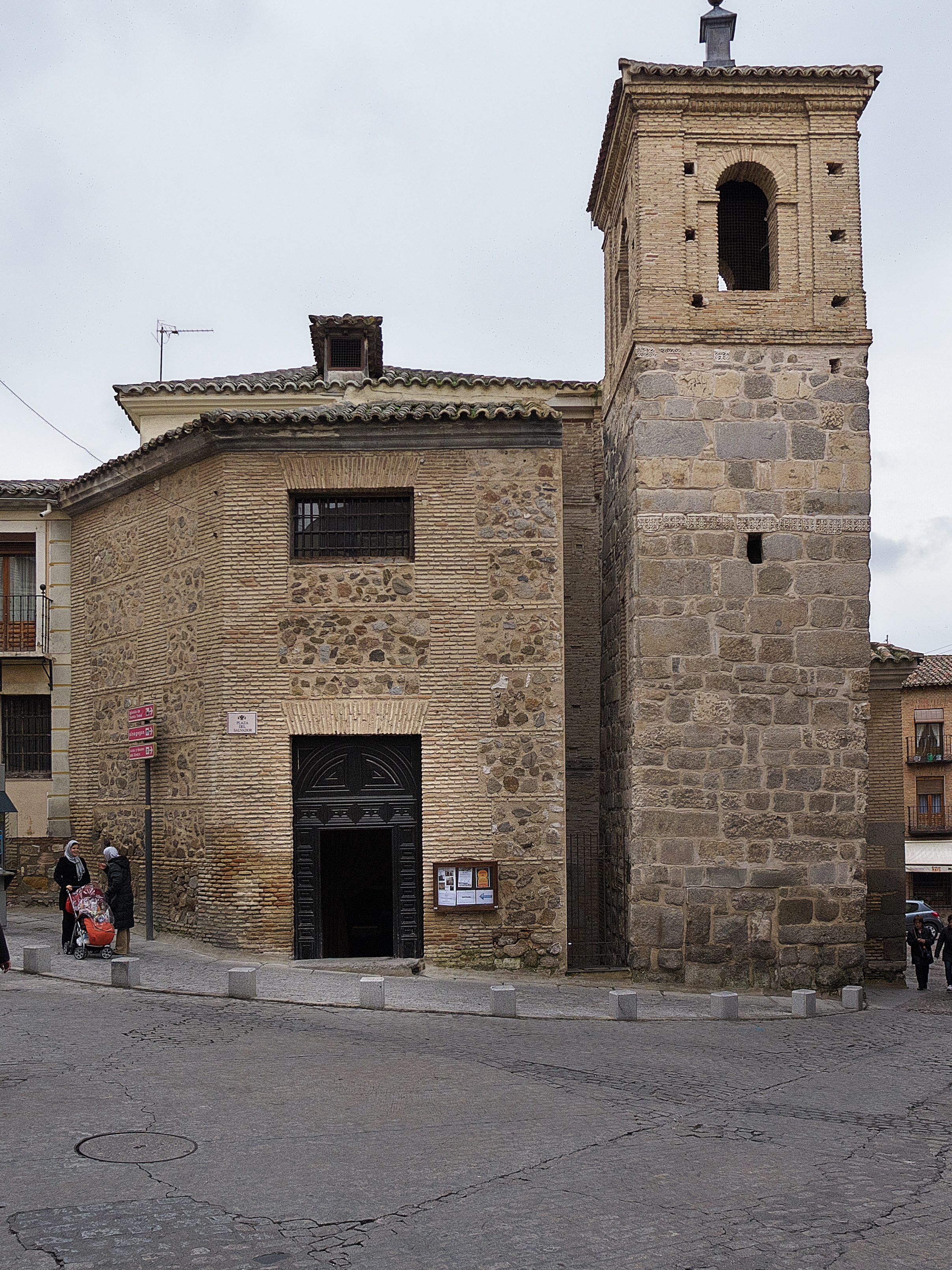 Antigua mezquita, transformada en iglesia en el año 1159. Conserva importantes restos visigodos.